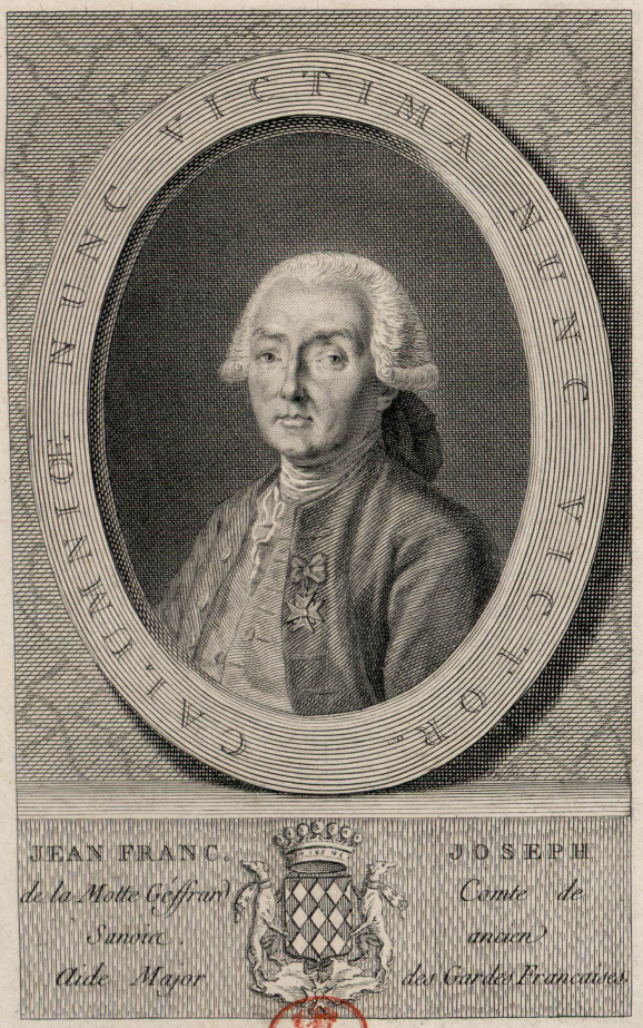 Jean-François Geffrard de La Motte, comte de Sanois